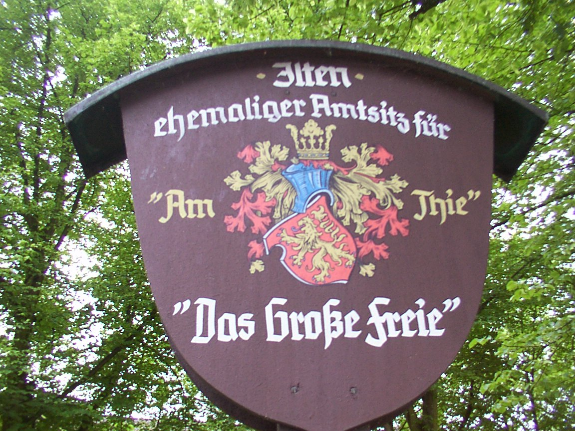 Sehnde: Tafel Ilten, Am Thie, ehemaliger Amtssitz für „Das Große Freie“ und Darstellung des Wappens Wappenbeschreibung „Im roten Schilde ein aufrechter blaubezungter und blaubewehrter goldener Löwe. Auf dem Schild ein Helm, der als Kleinod eine goldene Blätterkrone trägt. Die Helmdecke ist außen rot und innen golden.“